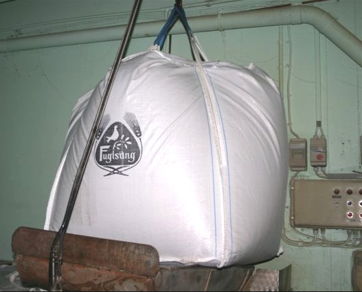 Föroya Bjór, Faroe Islands: Sack of Fuglsang malt from Danmark